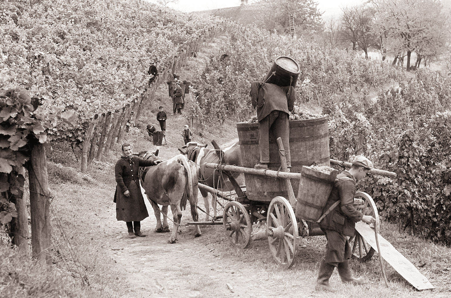 Trgatev vinogradniškega gospodarstva Jeruzalem - Ormož.